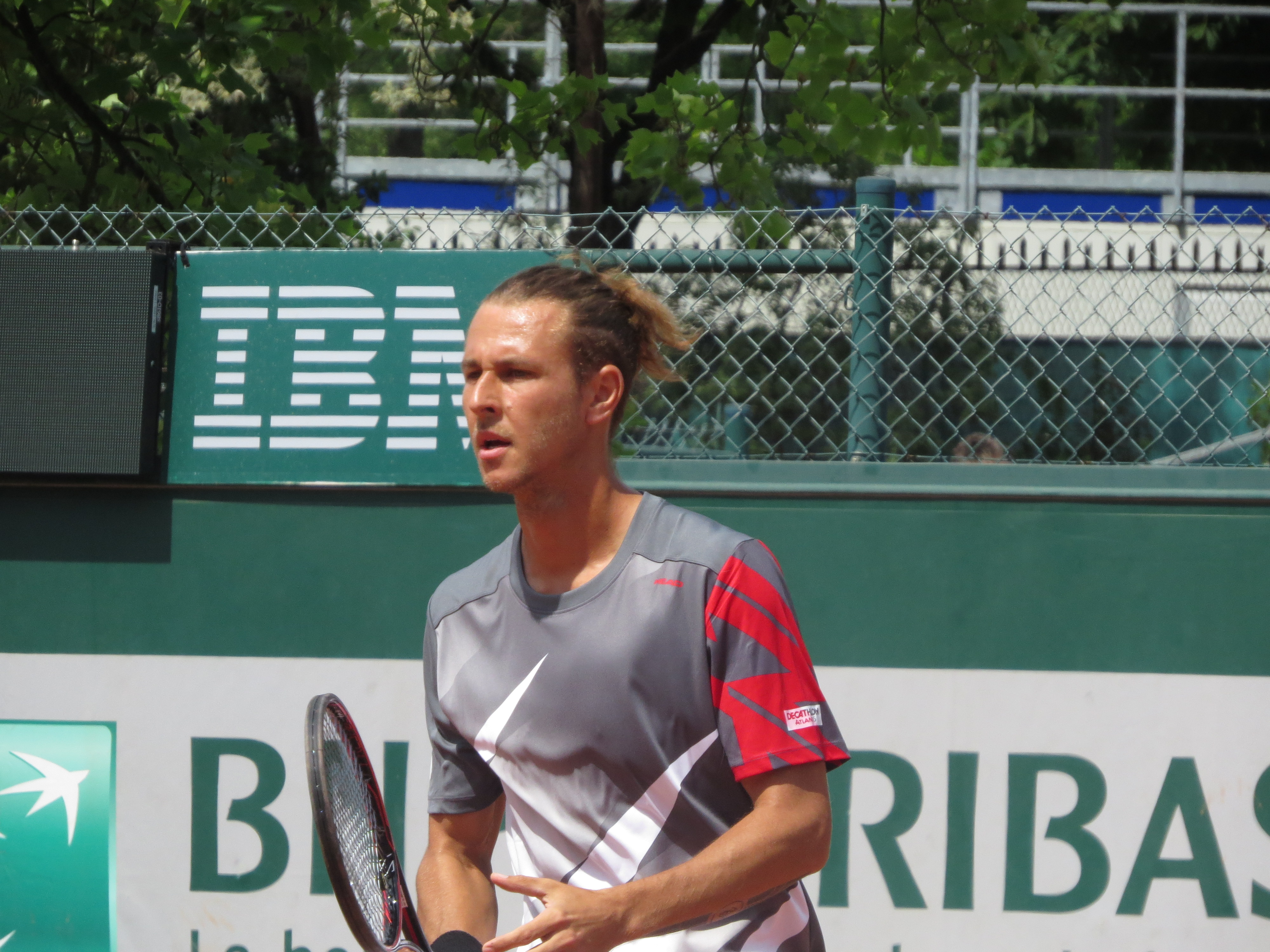 Gleb Sakharov lors de son deuxième tour des qualifications face à Stefanos Tsitsipas (court n°14)